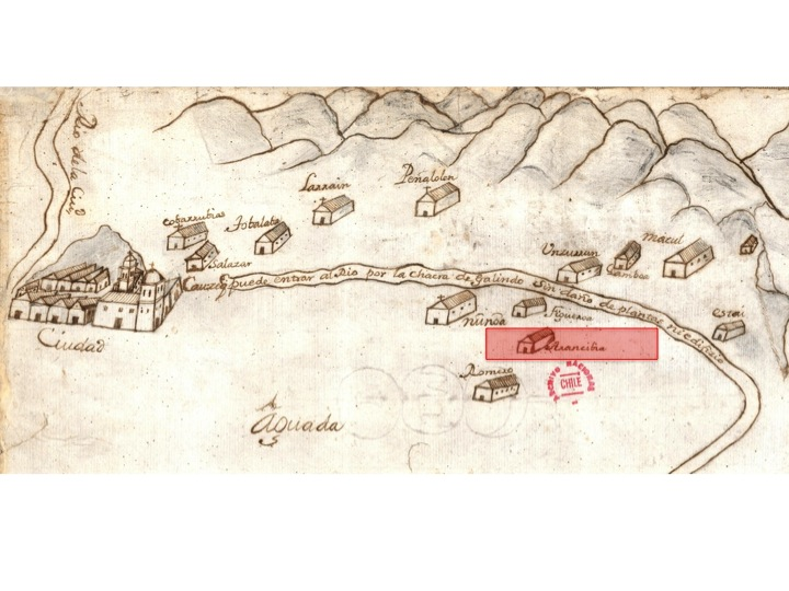 Esquema chacras coloniales de sector de Ñuñoa a mediados del s. XVIII.